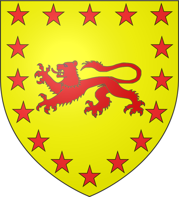 Blason : D'or, au léopard lionné de gueules accompagné de 16 étoiles de même posées en orle.